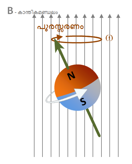 പുരസ്സരണത്തിലുള്ള പ്രോട്ടോൺ. കാന്തികമണ്ഡലത്തിന്റെ പ്രഭാവമാണ് പുരസ്സരണത്തിന് കാരണം.